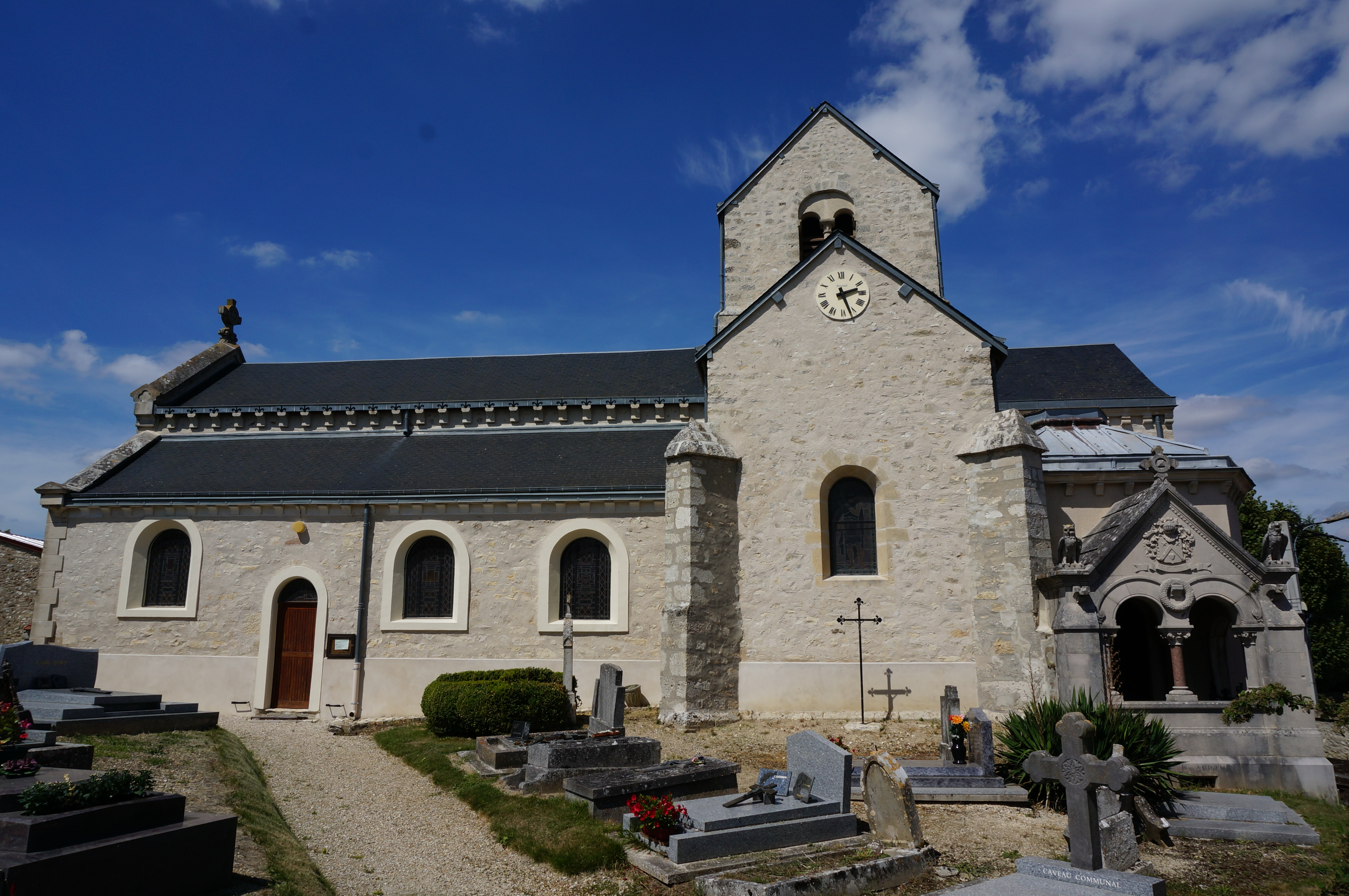 Dans le village .